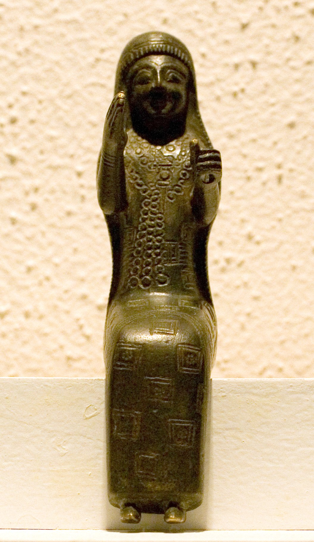 Arubani goddess